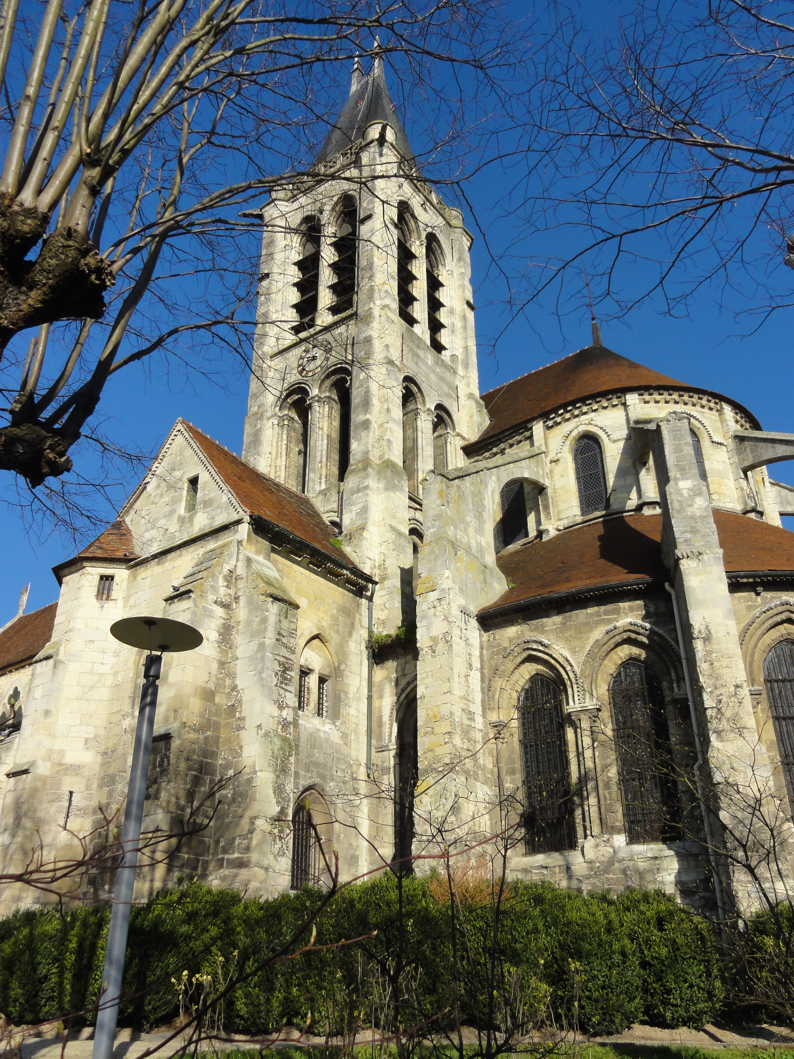 Église Saint-Pierre-Saint-Paul de Gonesse - voir titre.